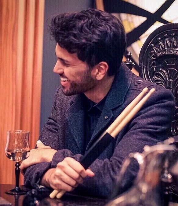 Davis Schulz, Disney Marvel Interview 2017